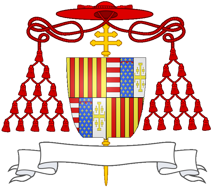 autore Borgosiepi, Stemma Cardinale Giovanni d'Aragona. Fonte: Chiesa Collegiata Santa Maria Maggiore Corpo di Cava-Cava de' Tirreni